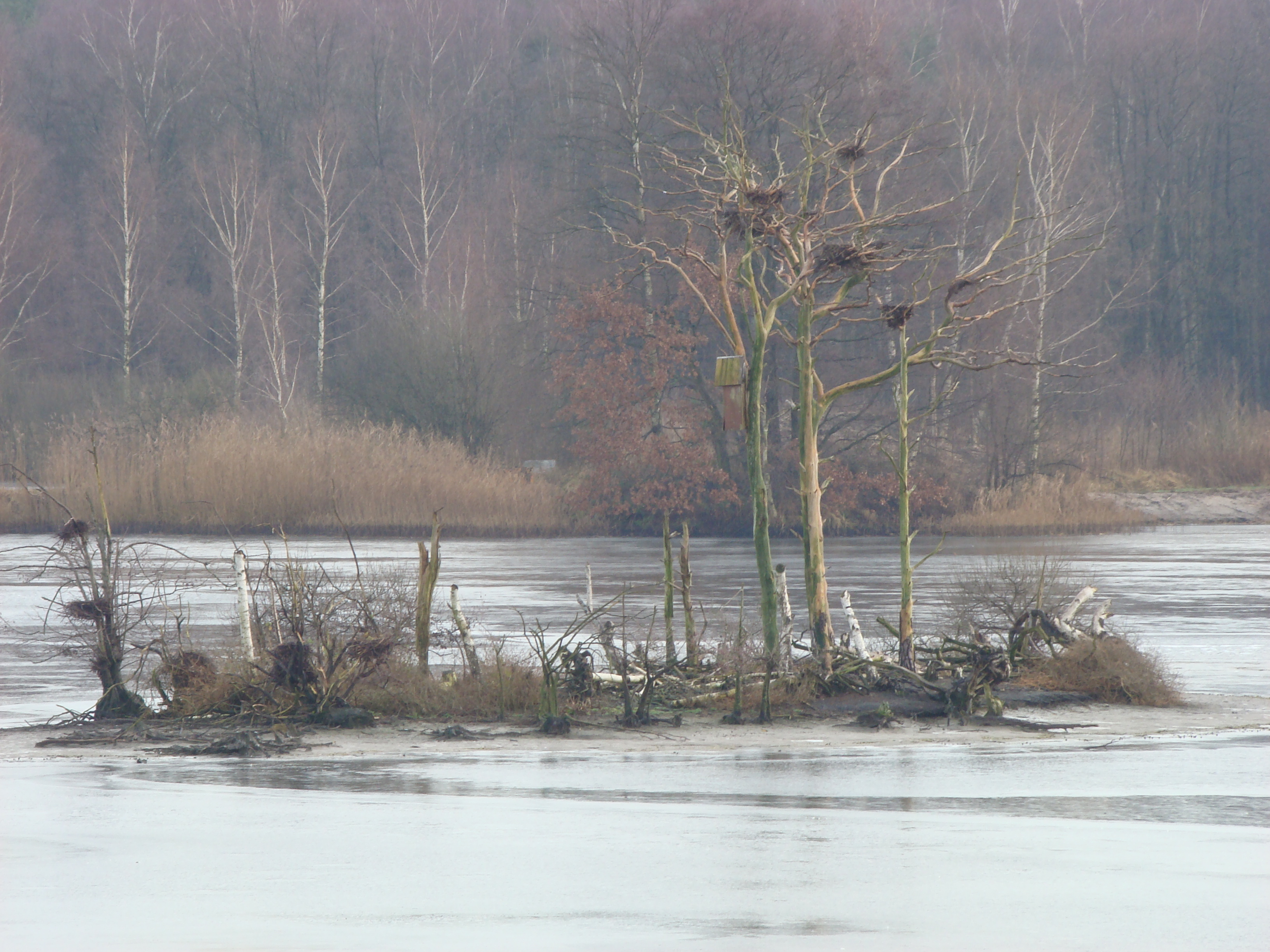 Kormoran-Insel im Naturschutzgebiet Cormorant island in the Meißendorf nature reserve, Lower Saxony, Germany.